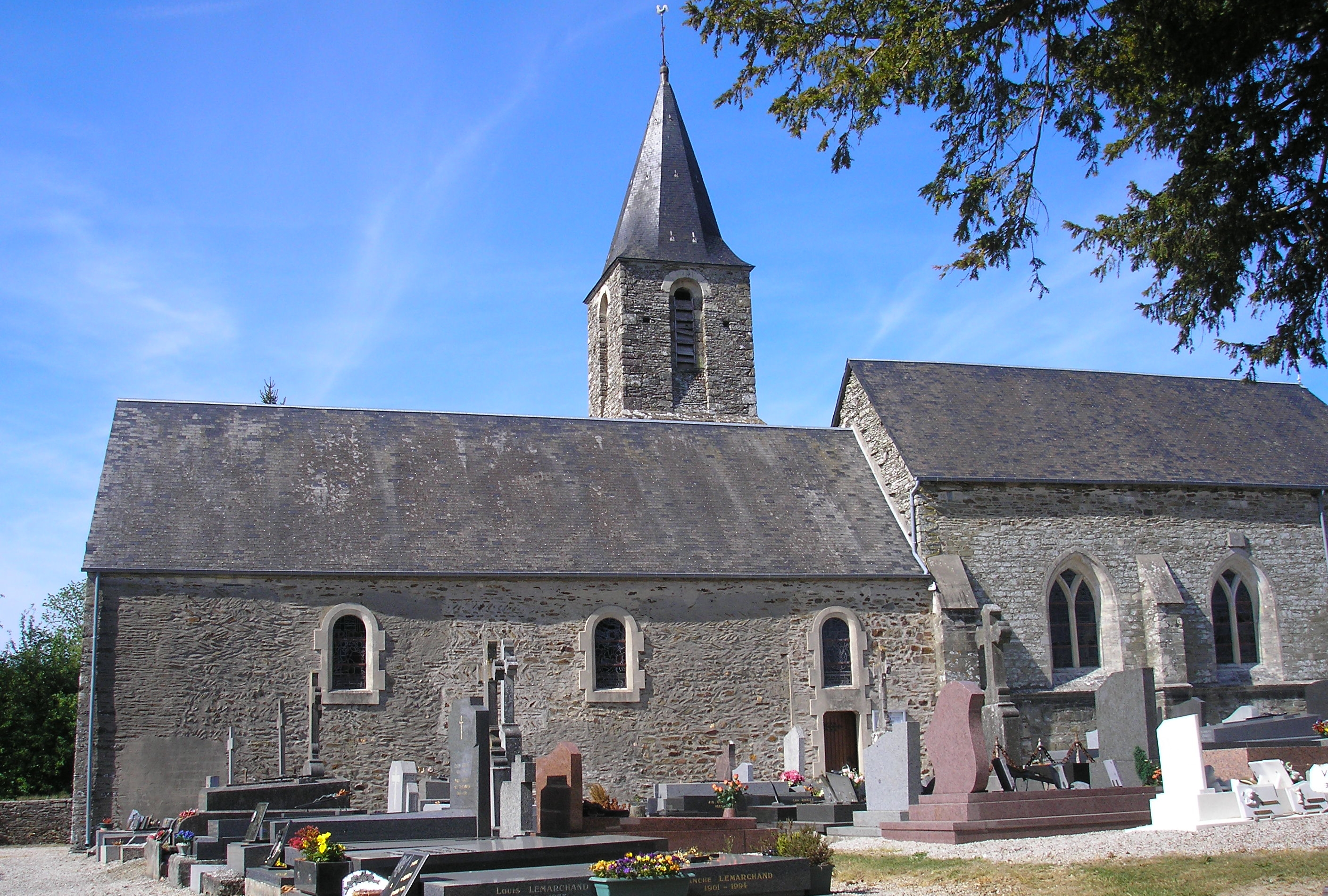 Gourfaleur (Normandie, France). L'église Notre-Dame.